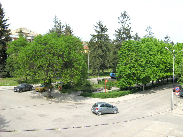 Централната част на Попово - април 2008 год. (снимката е направена от бившия Гранд хотел, като дублира тази от 30-те год. Фото: Вл. Стойков